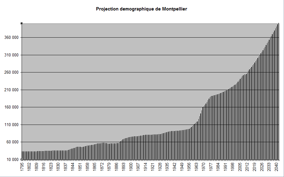 Projection de la population de Montpellier